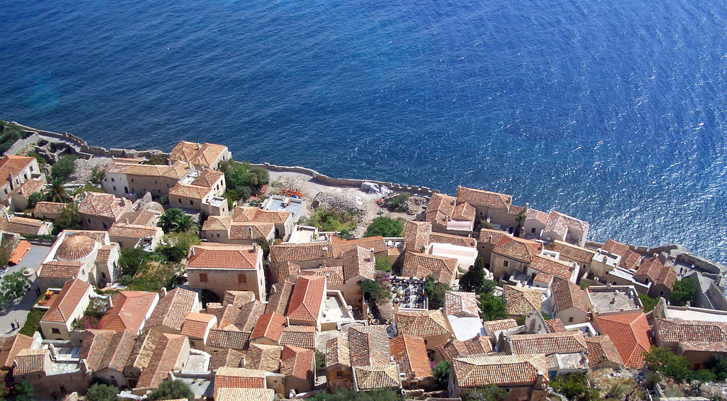 monemvasia from aboveCIMG2925